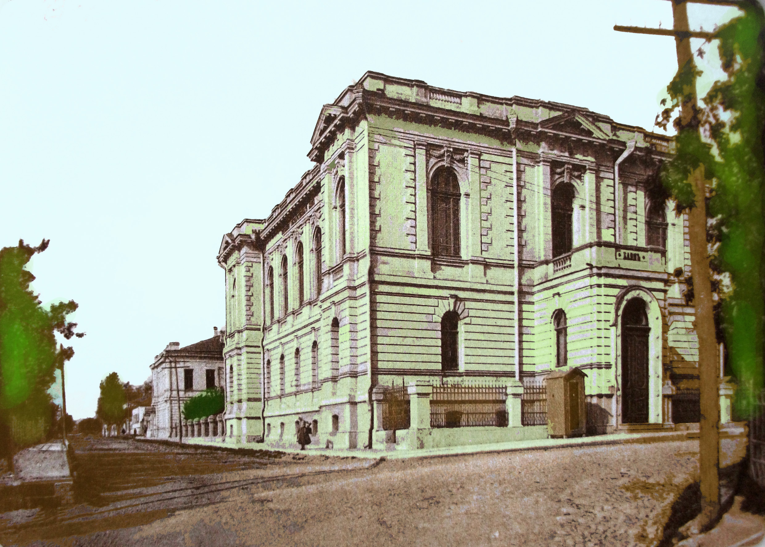 Здание земского банка. Город Сумы.